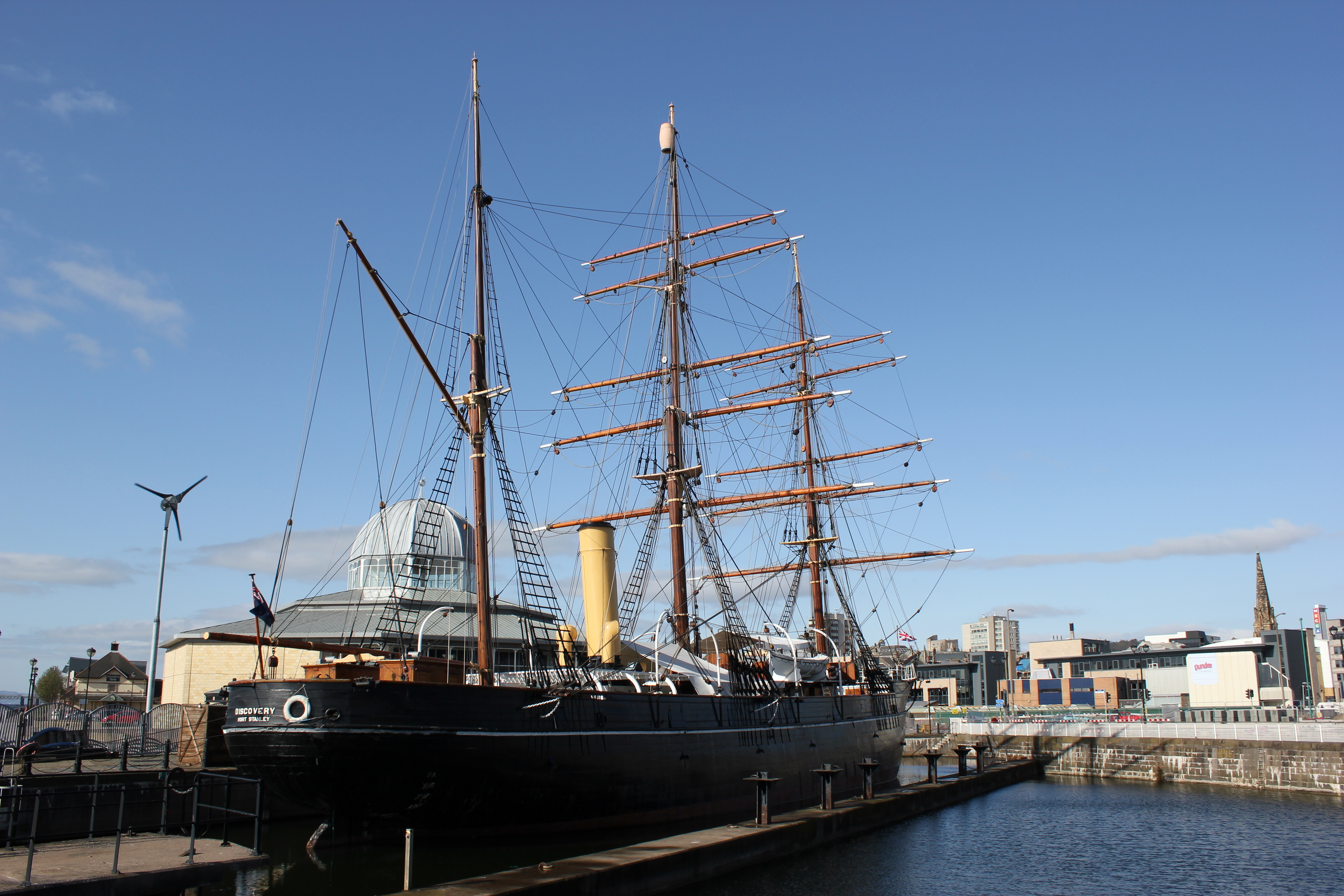 Die RRS Discovery als Museumsschiff im Hafen von Dundee, Schottland.